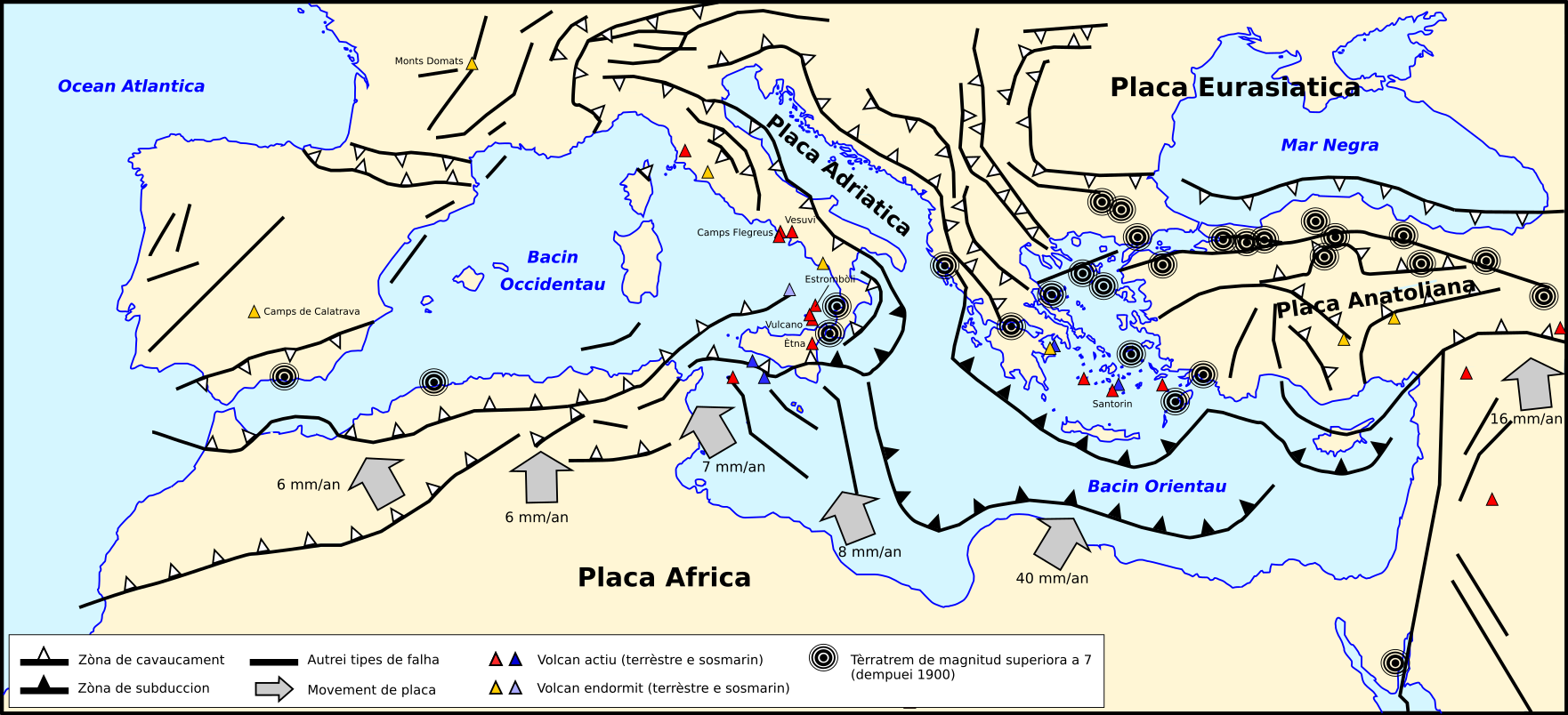 Esquèma generau de la tectonica dei placas en Mar Mediterranèa.